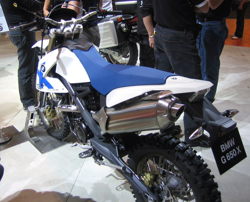 BMW G650 Xchallenge